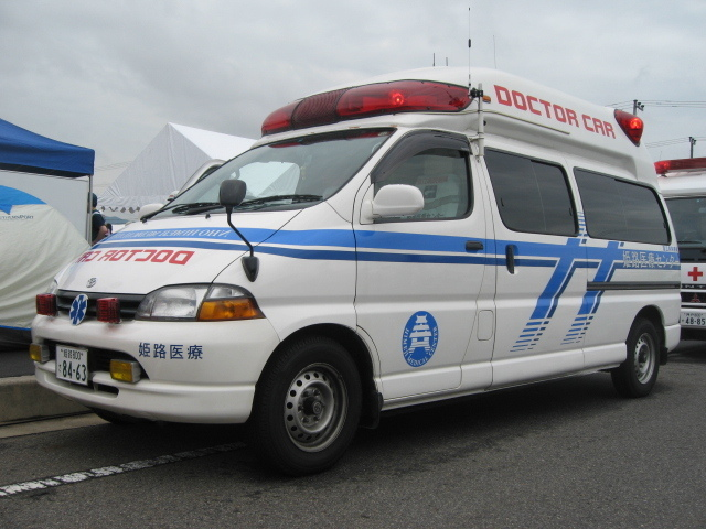 国立病院機構姫路医療センタードクターカー